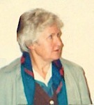 Photographie en couleurs de Marianne Mulon, prise en 1990.